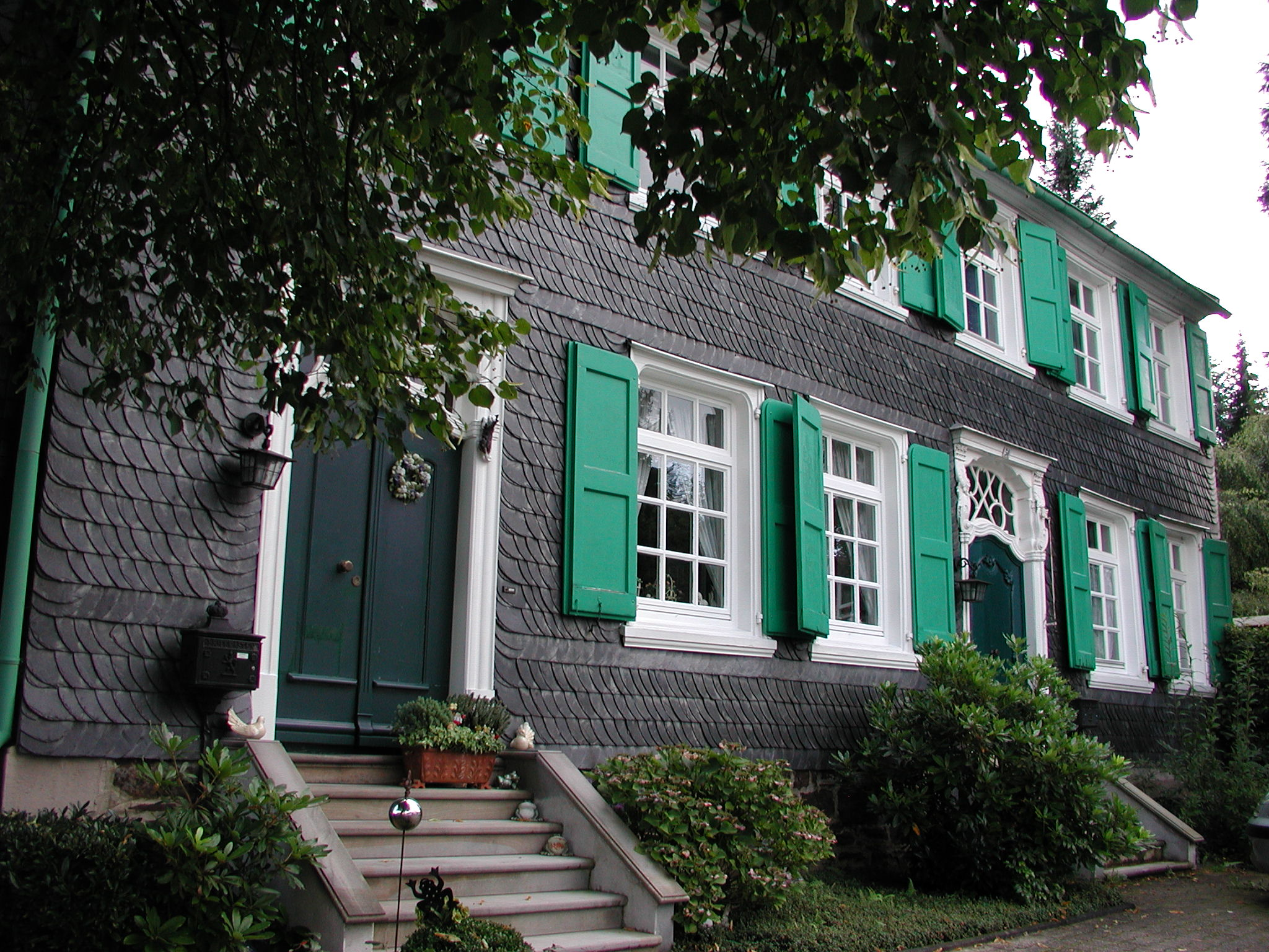 Haddenbach.JPG